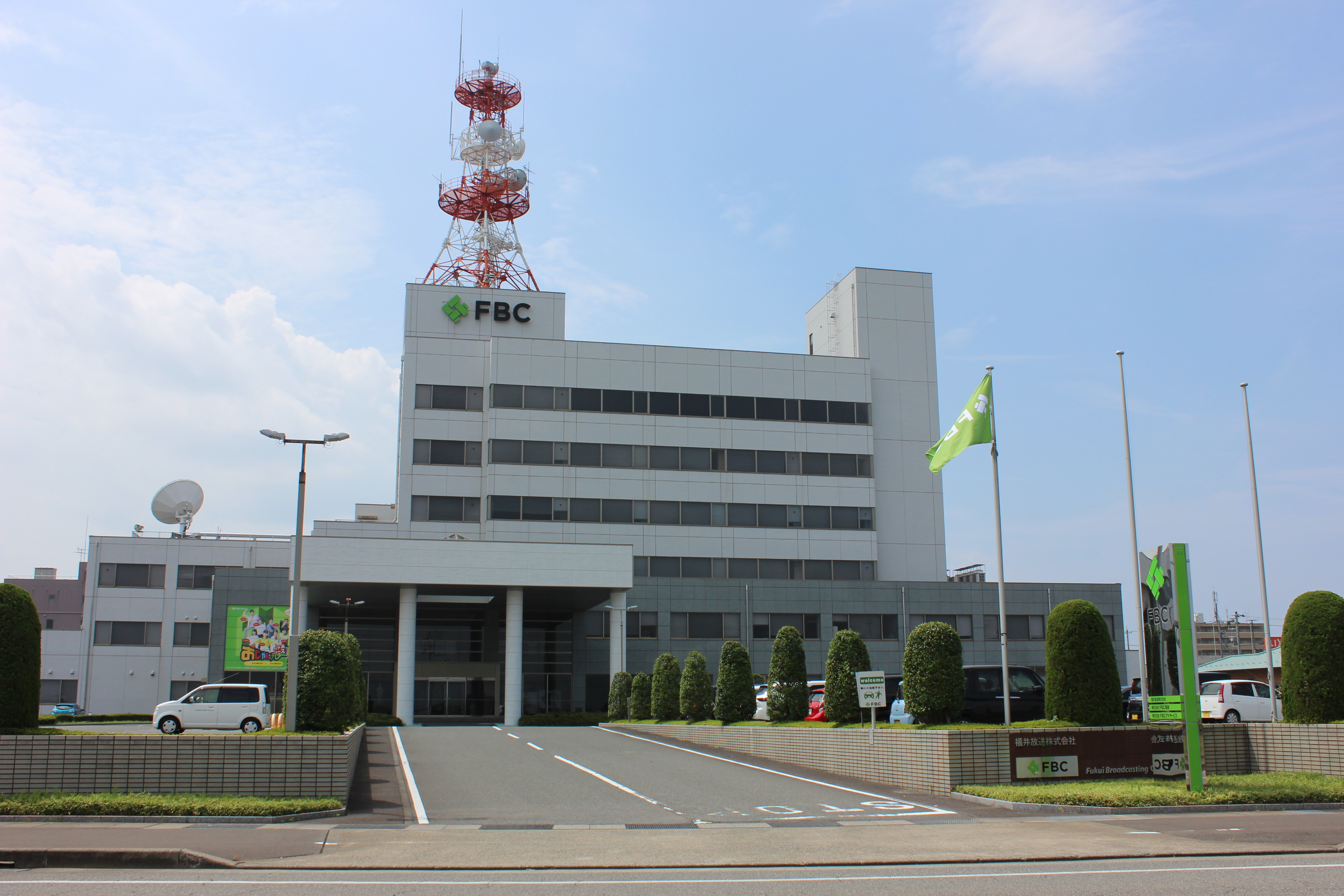 福井放送本社